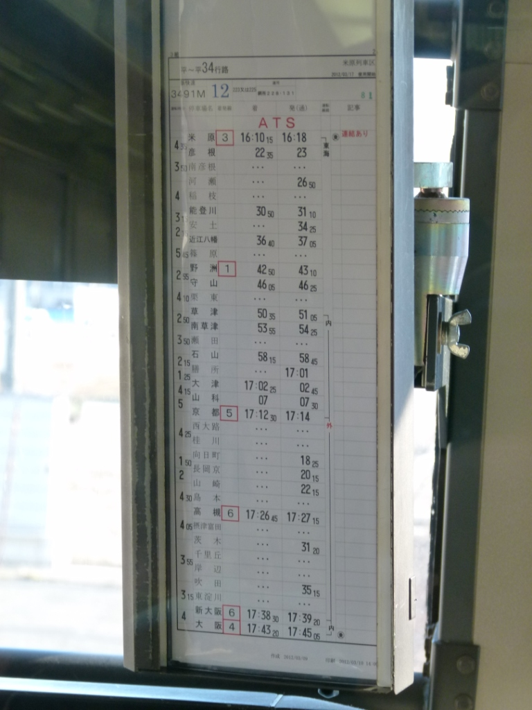 西日本旅客鉄道の運転士用乗務行路表